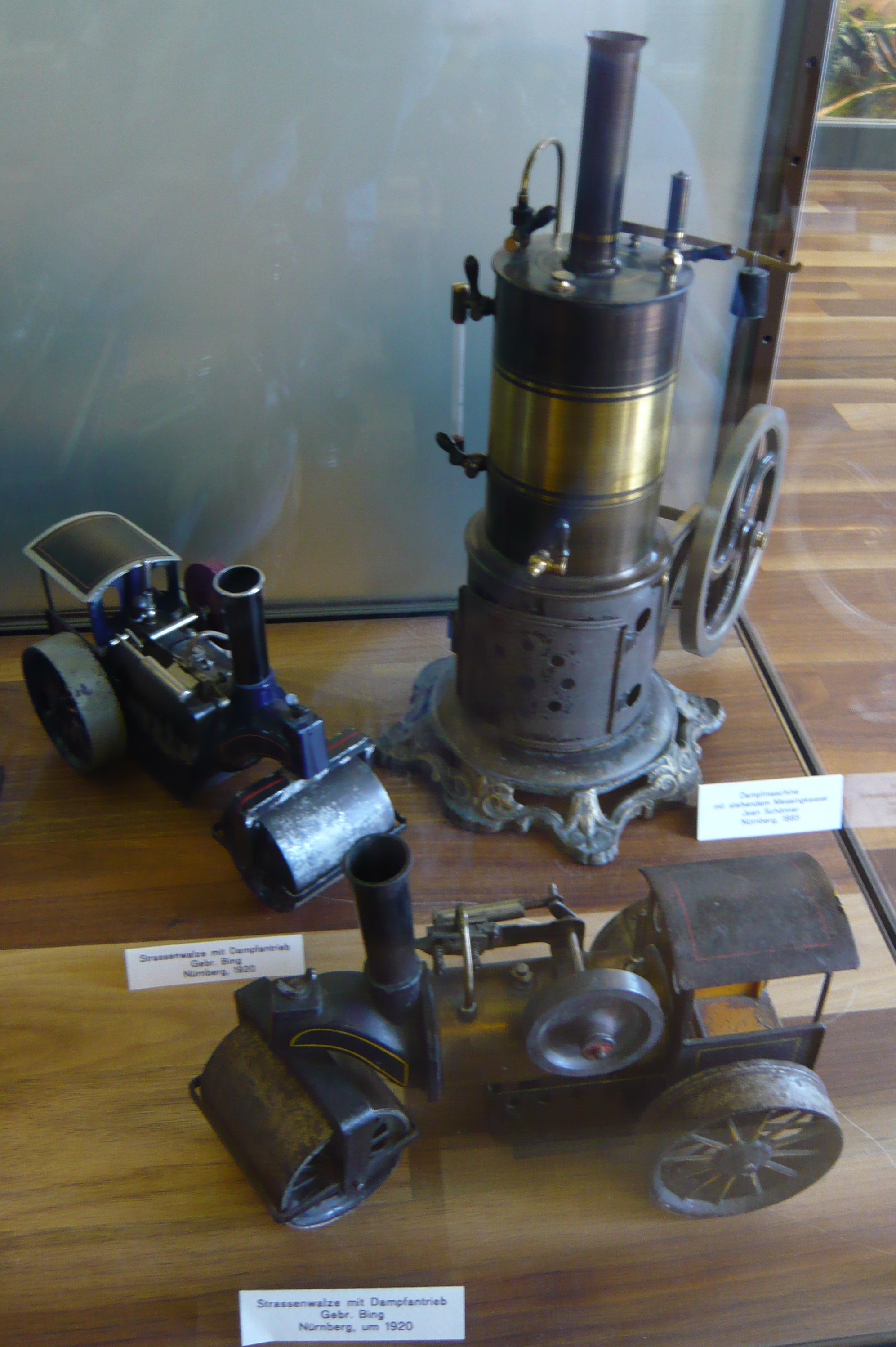 Zürcher Spielzeugmuseum Native nameZürcher SpielzeugmuseumLocationZürich, SwitzerlandCoordinates47° 22′ 23.16″ N, 8° 32′ 23.21″ E Established1956Web pageZürcher SpielzeugmuseumAuthority control : Q248517 VIAF: 155033967 LCCN: no2008003023 WorldCat institution QS:P195,Q248517